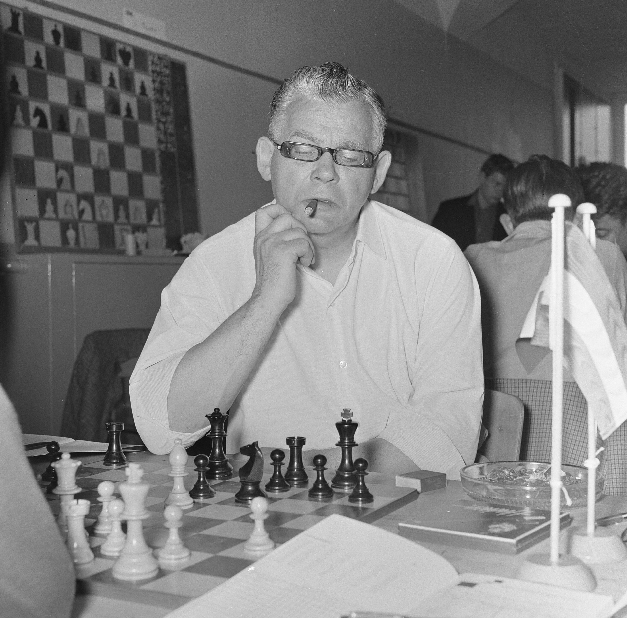 Collectie / Archief : Fotocollectie Anefo Reportage / Serie : [ onbekend ] Beschrijving : IBM schaaktoernooi, Ene Voldsen (Denemarken) Datum : 25 juli 1965 Locatie : Denemarken Trefwoorden : schaken, tournooien Instellingsnaam : IBM Fotograaf : Kroon, Ron / Anefo Auteursrechthebbende : Nationaal Archief Materiaalsoort : Negatief (zwart/wit) Nummer archiefinventaris : bekijk toegang 2.24.01.03 Bestanddeelnummer : 917-9980